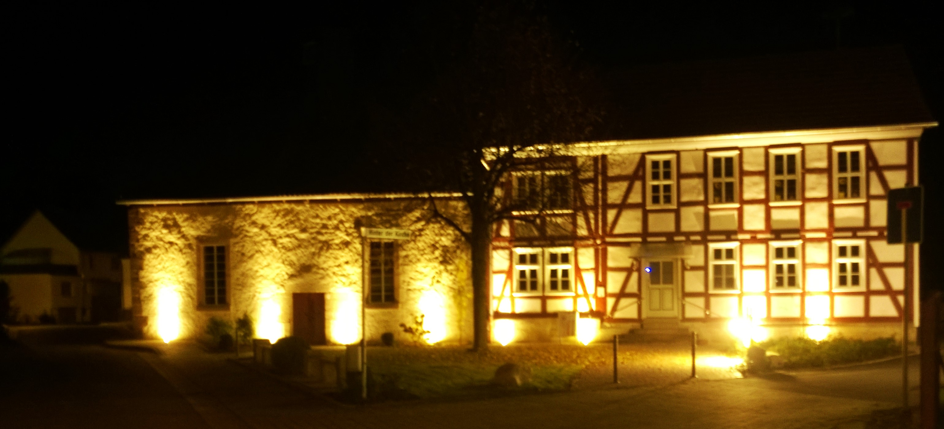 Kirche und Haus der Generationen in Wahlshausen mit neugestaltetem Vorplatz in 2012